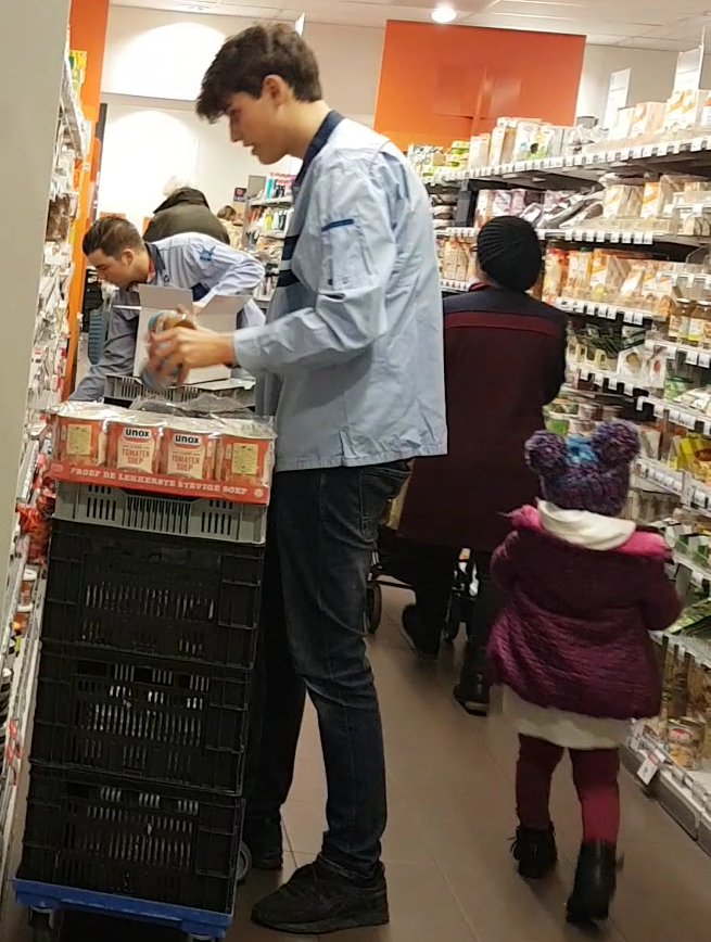 Zwei Schüler, 18 und 19 Jahre alt, füllen in den Sommerferien Regale im Supermarkt auf.